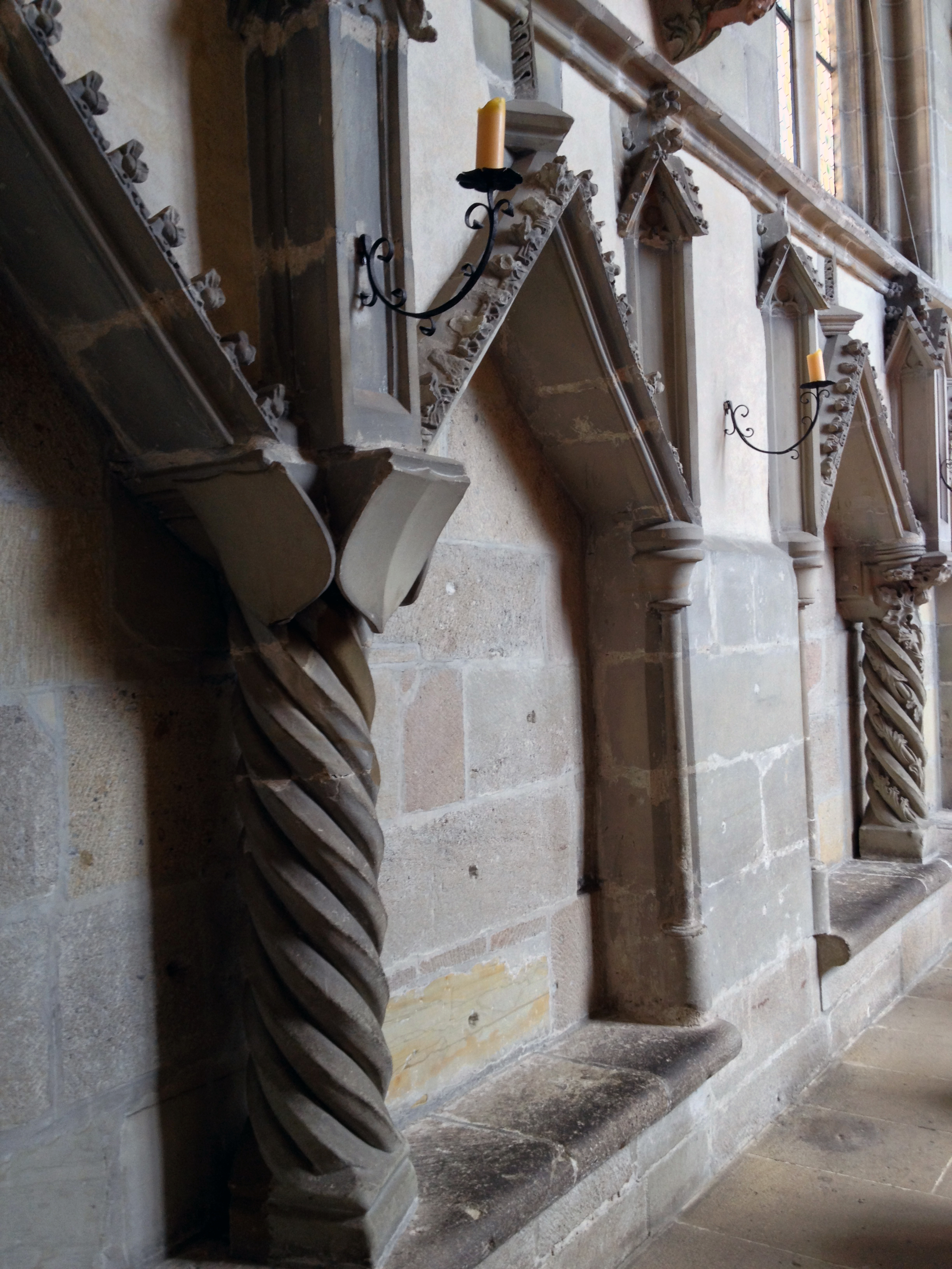 sedile